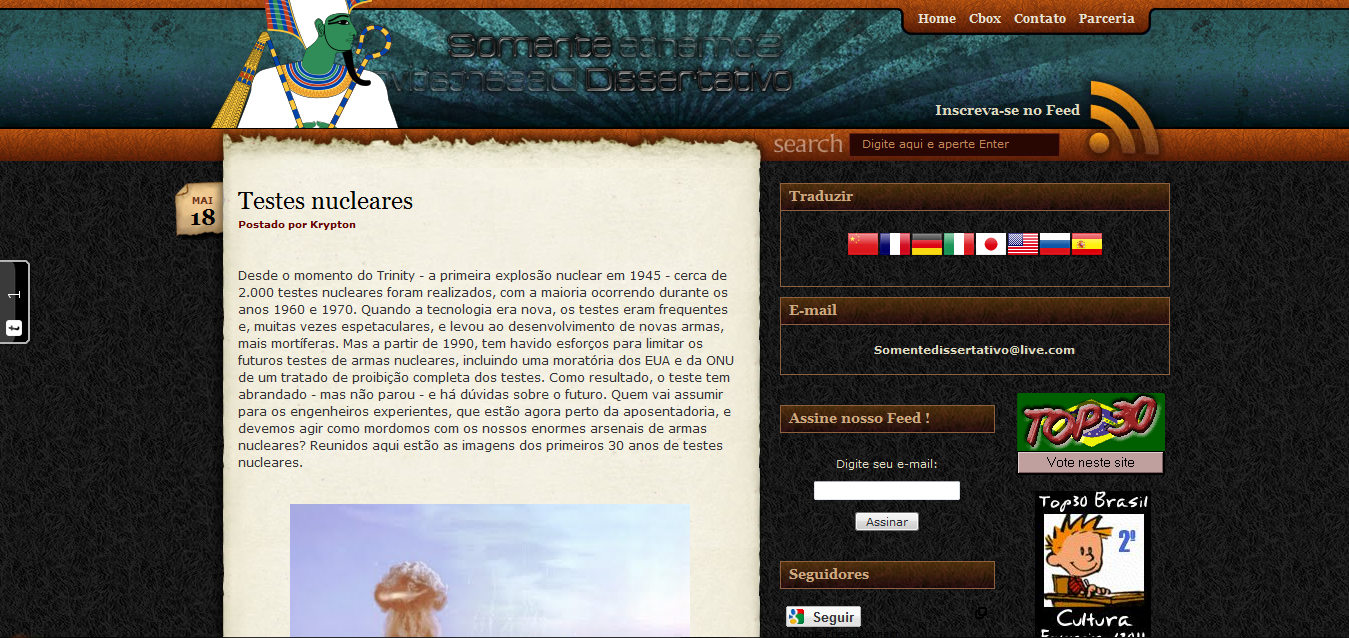 Um print screen do blog